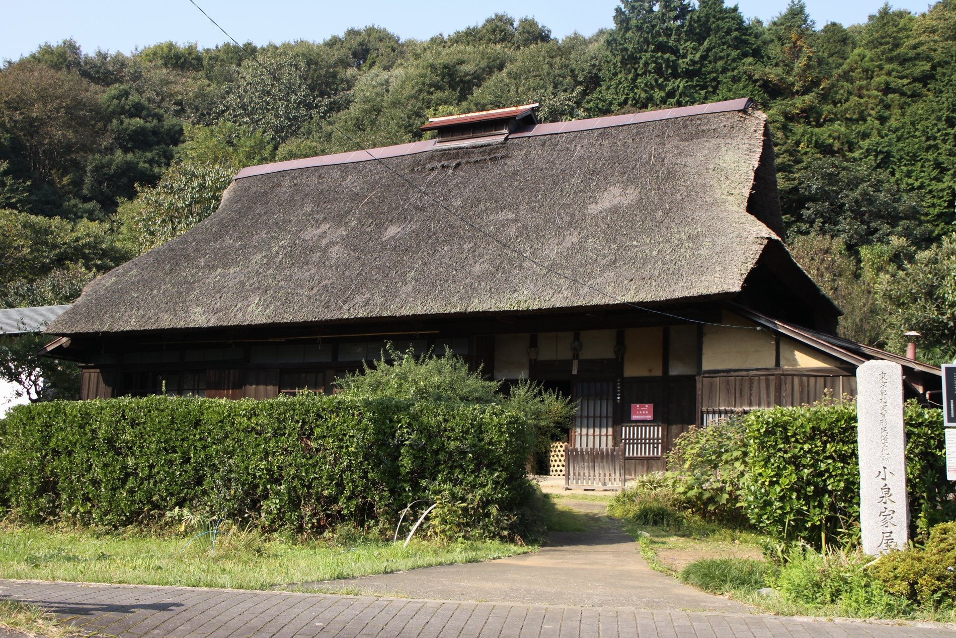 小泉家屋敷